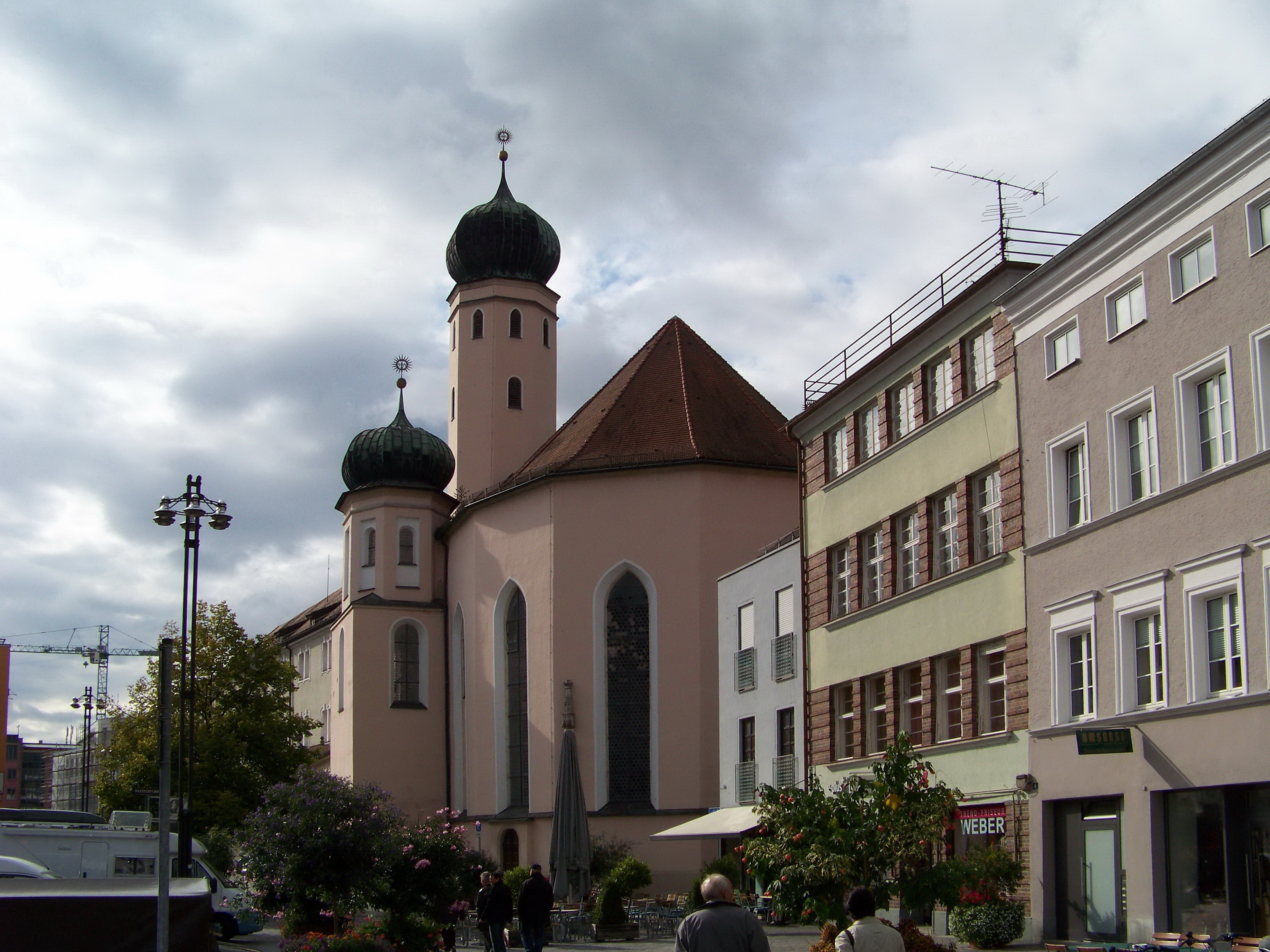 Straubing, Theresienplatz 46. Ehem. Jesuitenkirche, im Kern spätgotisch, ab 1680 Umbau zum einschiffigen Raum mit zwei turmartigen Kapellenausbauten; mit Ausstattung.